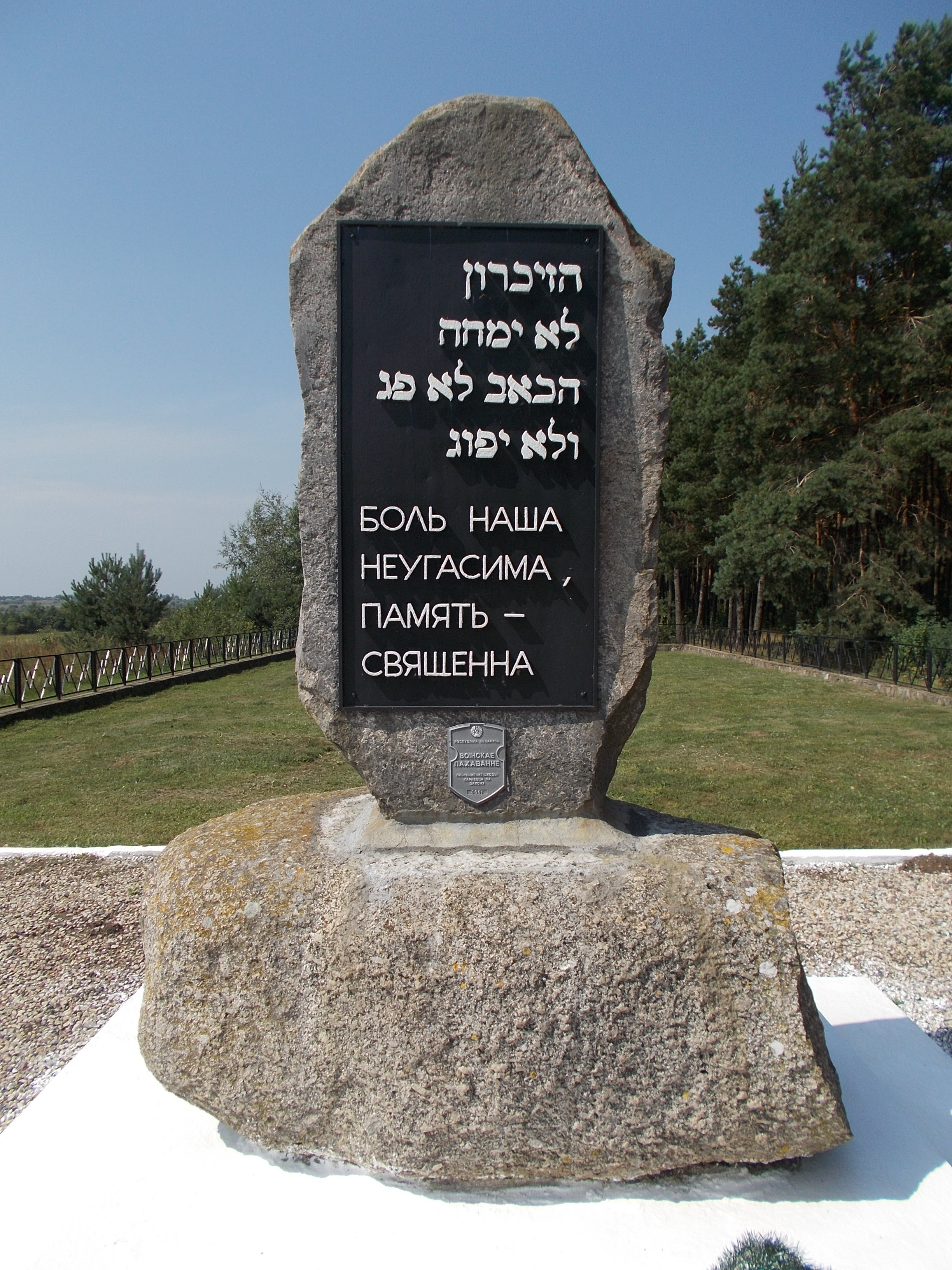 Глубокое Витебской области. Памятник убитым евреям - узникам гетто.